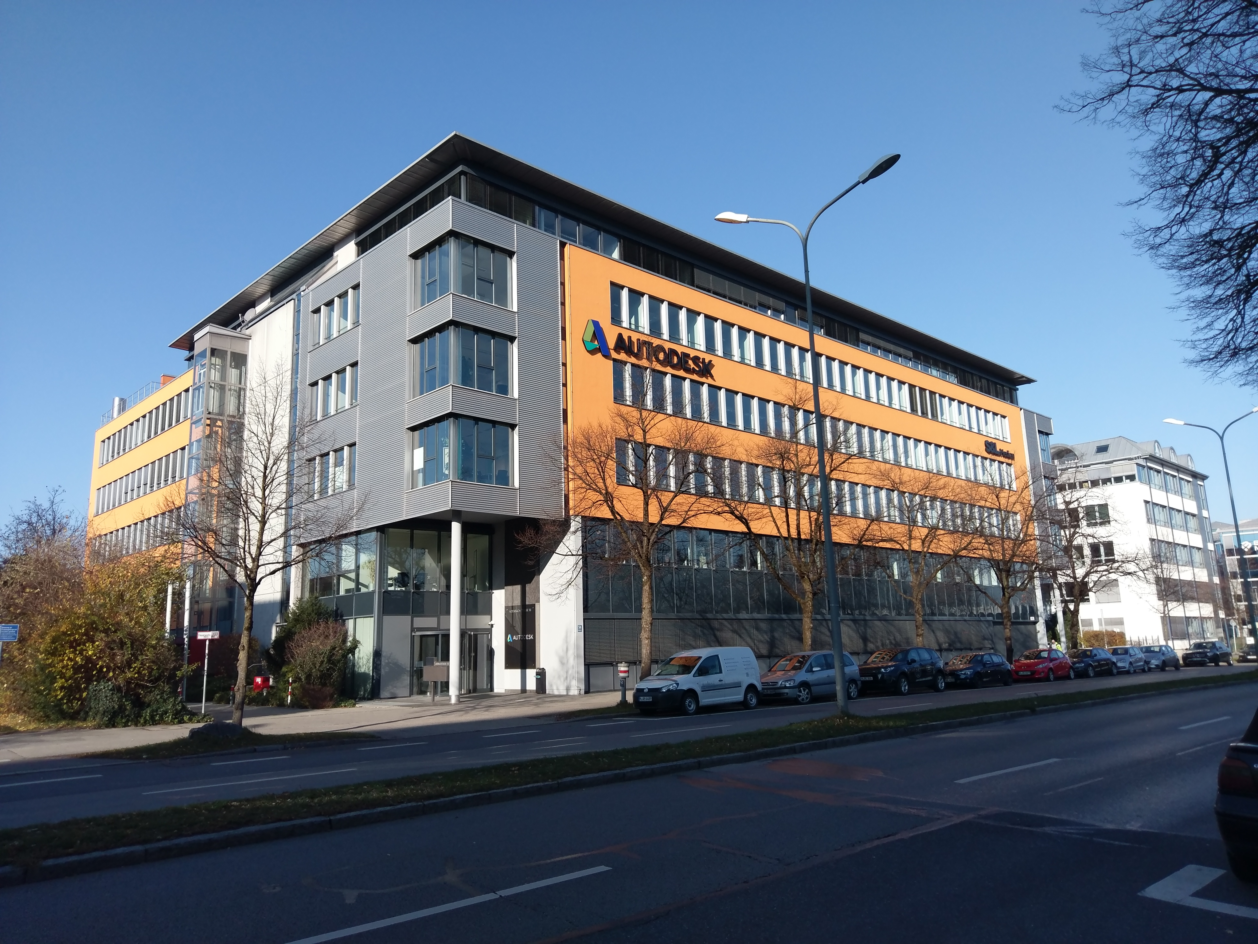 Aidenbachstraße 56, 81379 München